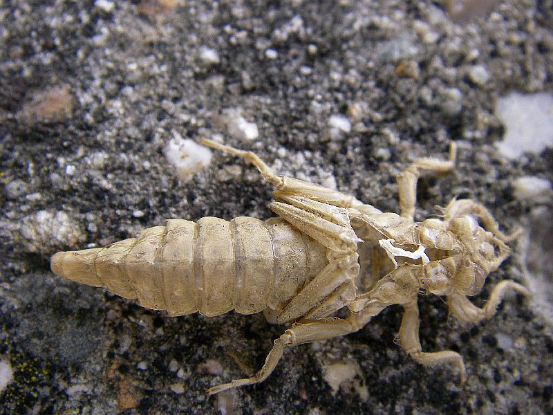 Gomphus flavipes, exuvium. Location: Belgium - Zandhoven - Albertkanaal